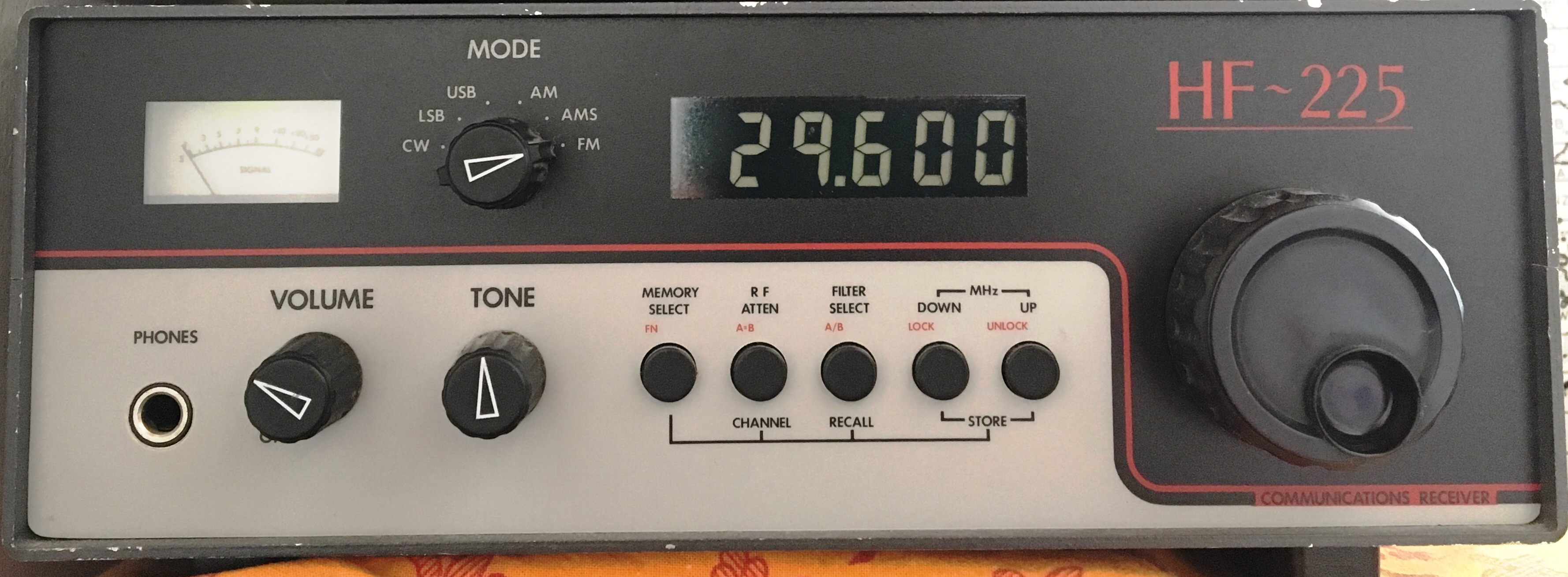 Récepteur sur 29600 kHz utilisé pour l'écoute des appels radioamateurs en FM. Récepteur Lowe HF225, 30kHz à 30MHz.